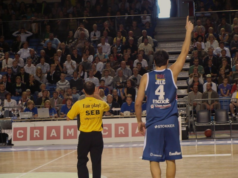 Dušan Jelić sekkumas mängu 2008. aasta viimases BC Kalev/Cramo ja Tartu Ülikool/Rocki vahel peetavas Meistriliiga finaalmängus.